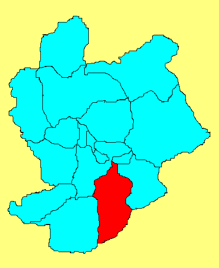 涿鹿县在张家口市的位置；此图片由王云峰wangyunfeng原创，用于WIKI。